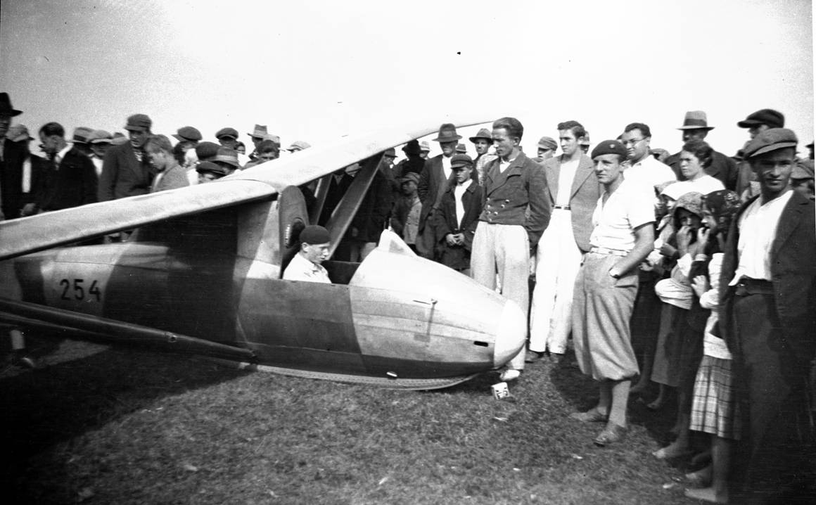 szybowiec na którym odbywało loty Koło Szybowcowe LOPP Jarosławiu,Edmond Wilhelm Brillant after landing in the picture, the Jaroslaw Gliding Club